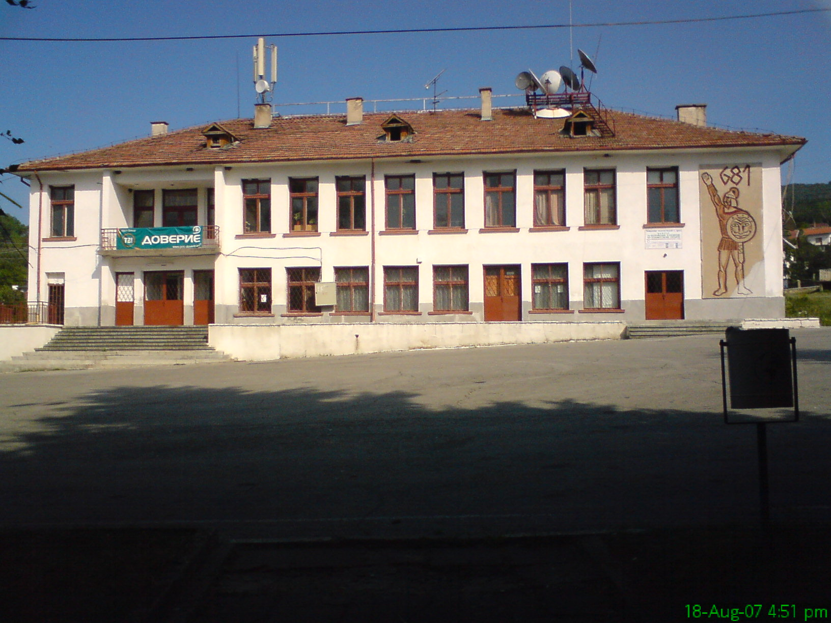 Читалището в село Дрен